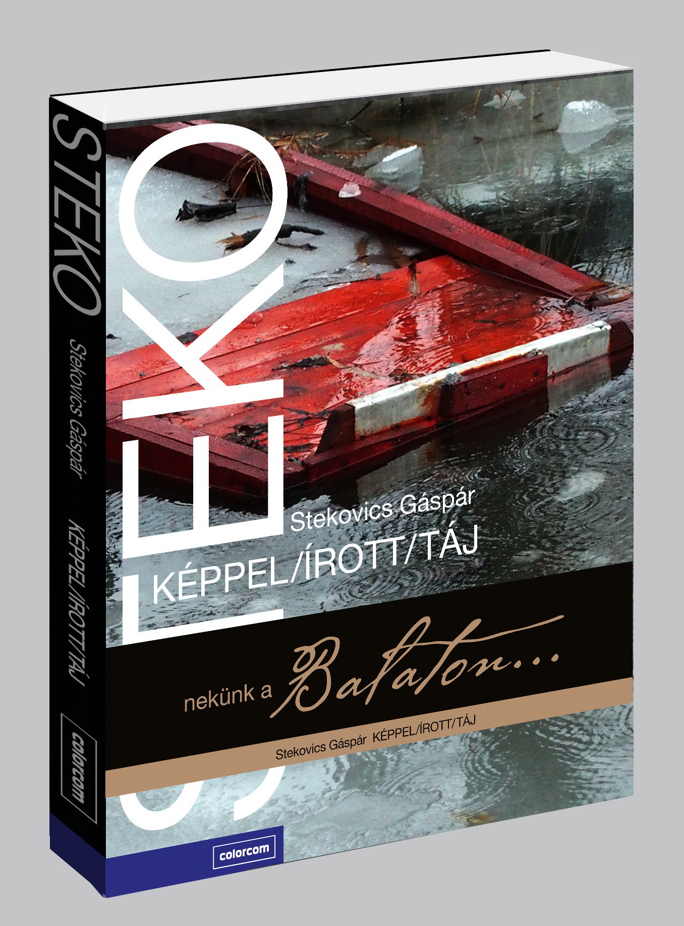 Stekovics Gáspár Képpel írott táj című könyvének borítója